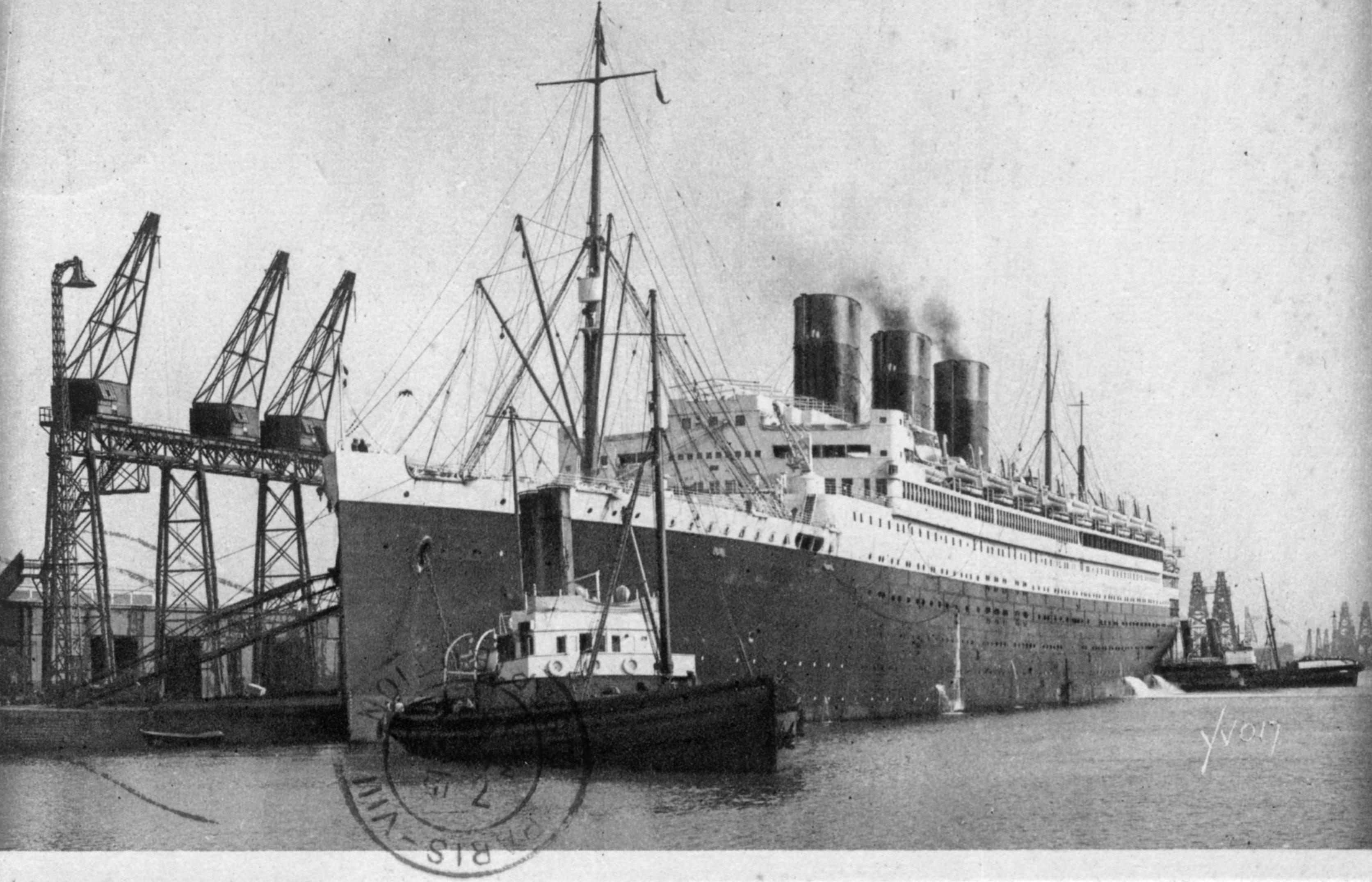 Le Transatlantique Paris. Editions D'art Yvon – 14, rue de Bretagne – Paris, collection « La Douce France »